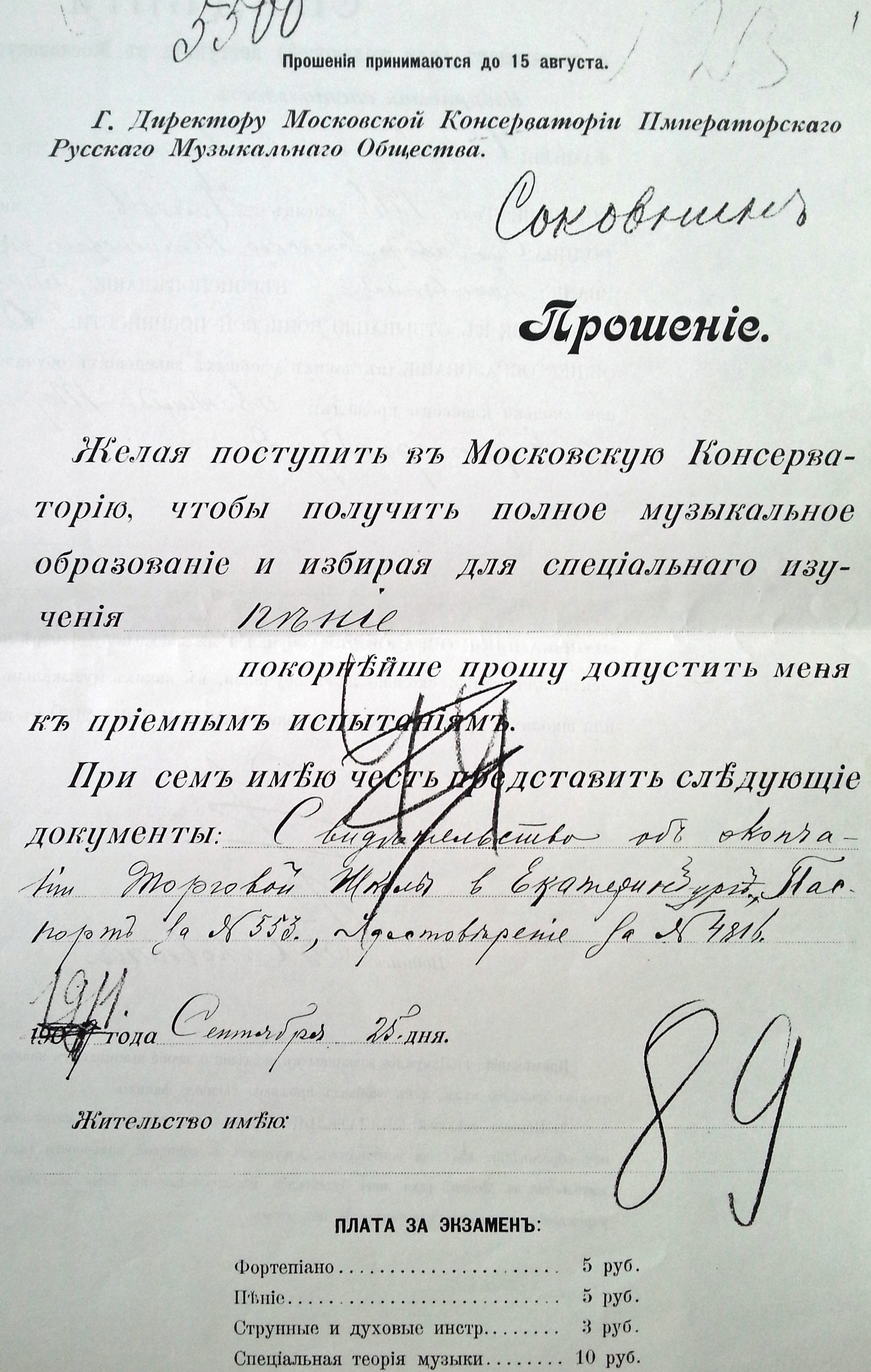 Прошение В..А. Соковнина о приеме в МГК. 1911 г.